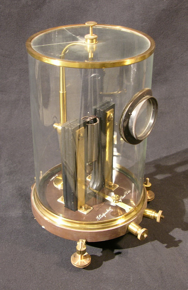 La base dello strumento è in legno e a sezione circolare. Poggia su tre viti calanti in ottone e ospita due morsetti per i collegamenti elettrici che sono posizionati nello spessore della base e disposti radialmente. Dalla base si innalzano verticalmente i poli di una calamita composta simmetrica rispetto al centro della base stessa e tenuti in posizione da piccole staffe in ottone. Al centro dei due elettromagneti è posizionata una bobina mobile sospesa per mezzo di un sottile filo sorretto da un'asta fissata alla base. Lo strumento è ricoperto da una campana cilindrica di vetro (due piccole crepe sono presenti nella parte superiore) nella quale è localizzata una finestra ottica per l'osservazione; da qui era possibile misurare lo spostamenteo dell'equipaggio mobile sotto l'effetto della corrente che veniva fatta passare nel cicrcuito consentendone la misurazione. Funzione Come ogni altro galvanometro anche questo esemplare veniva utilizzato per determinare e misurare la corrente elettrica passante all'interno di un circuito.